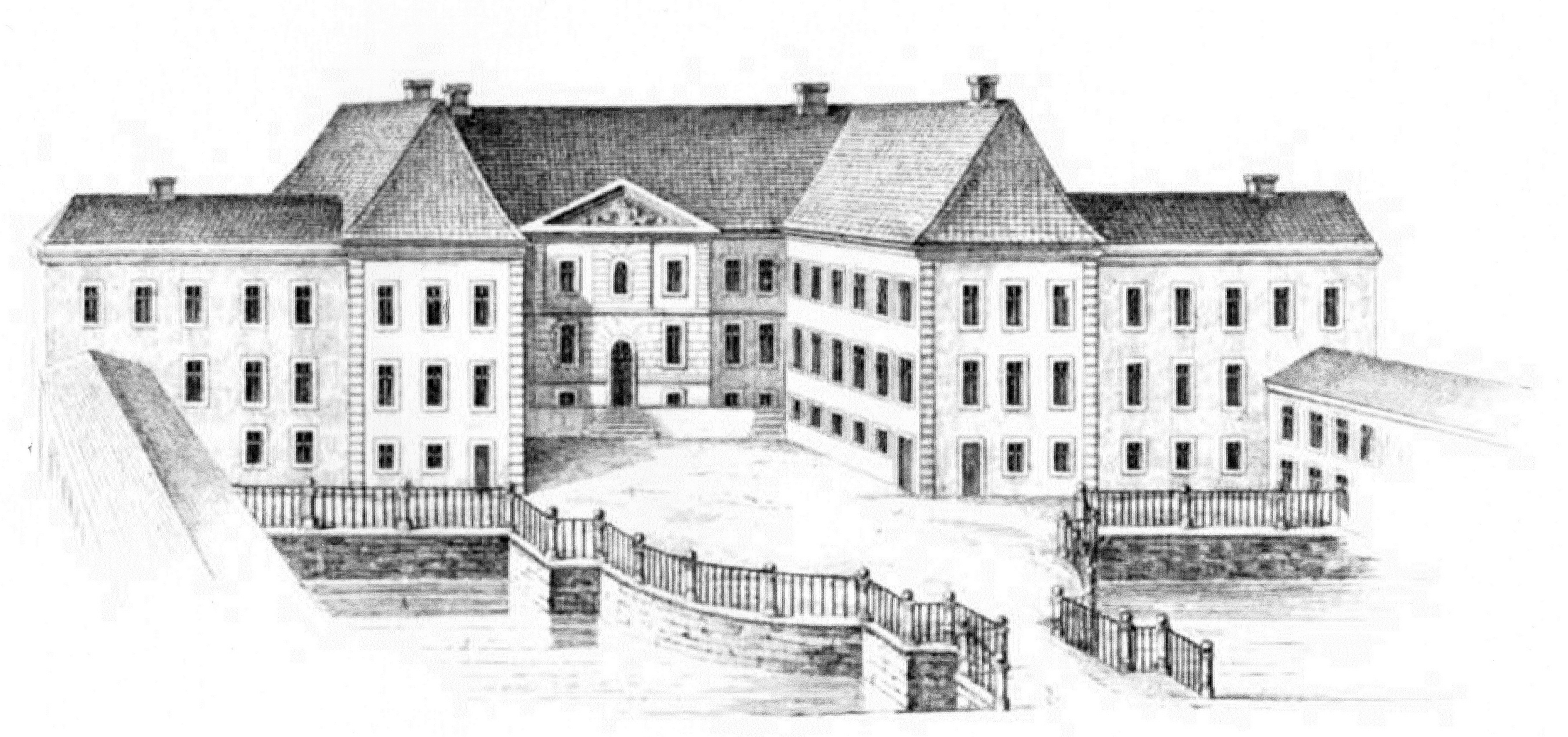 Gut Drage, Zeichnung von Köhler und Roisternitz 1862